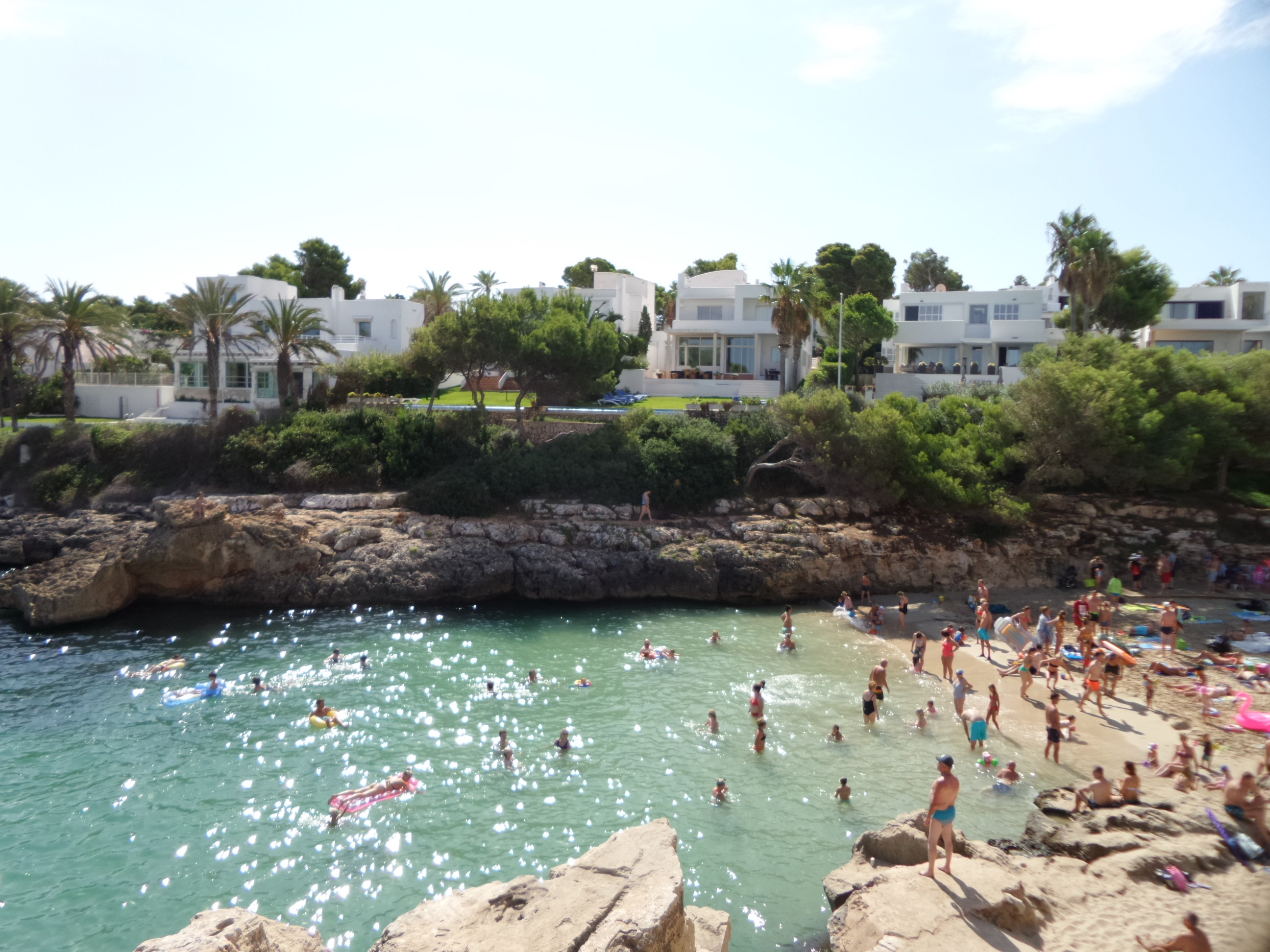 Caló d'es Pou (Strand) an der Cala Llonga (Cala d'Or)